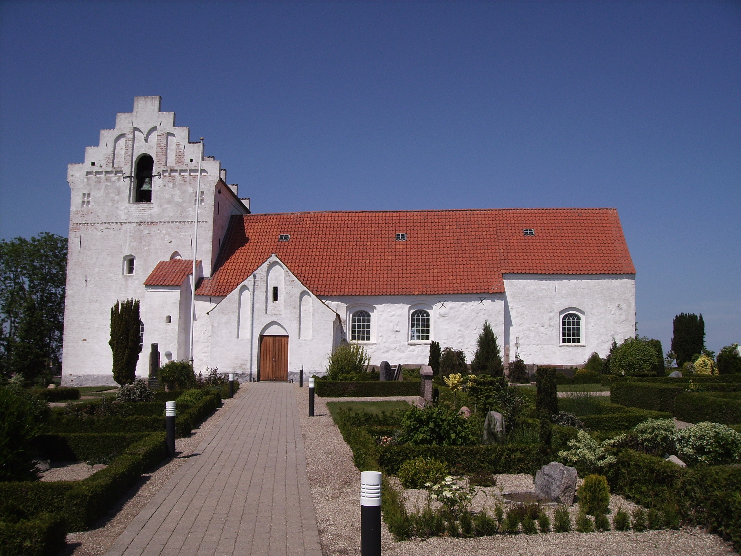 Drigstrup Kirke, Drigstrup Sogn, Bjerge Herred, Odense Amt, Denmark (Danish Church) - Drigstrup Kirke fra syd